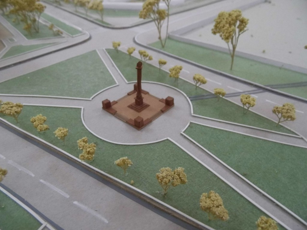 Проект стелы «Город Воинской Славы» в Бендерах